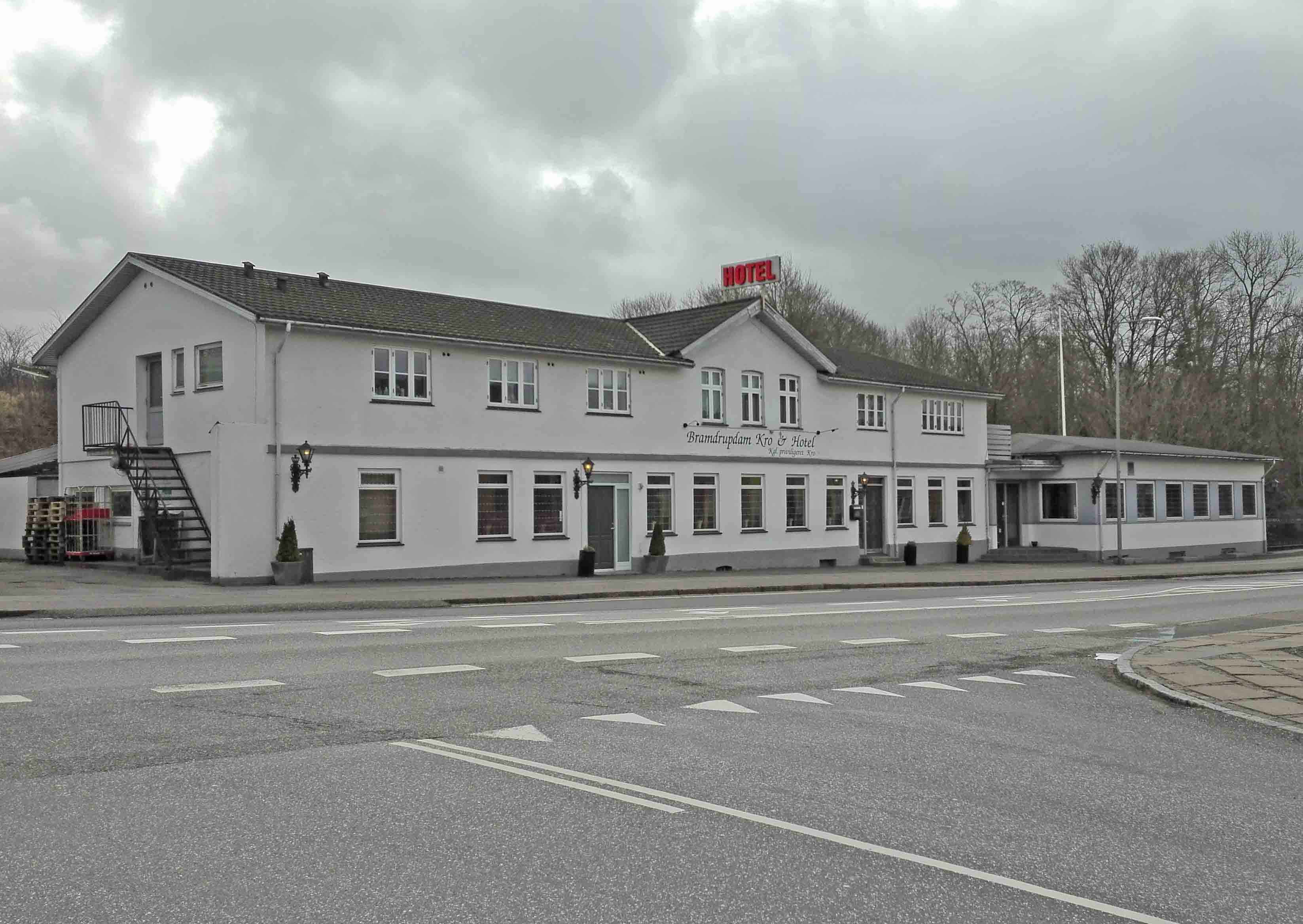 Bramdrupdam Kro